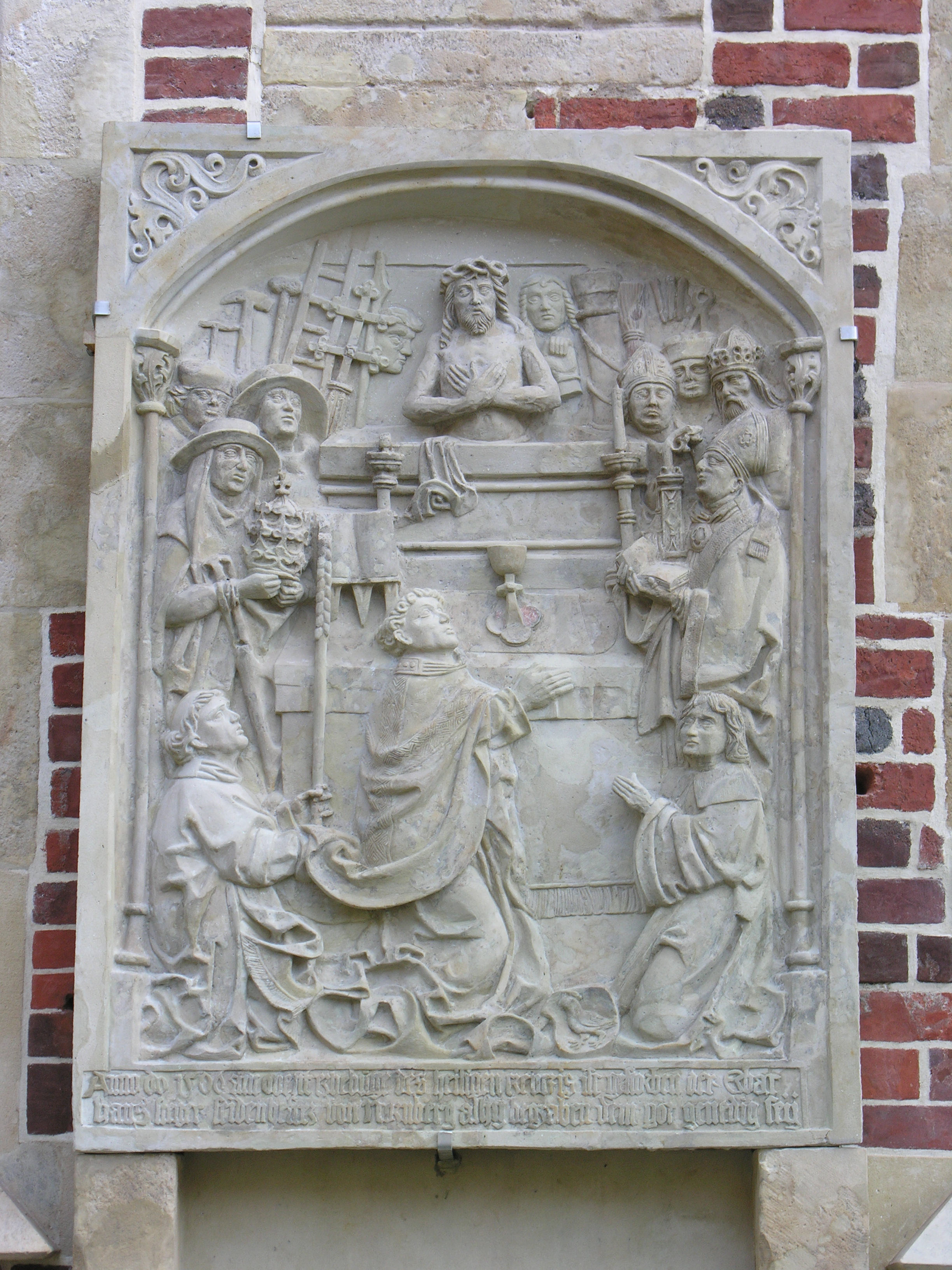 Katedra św. Jana Chrzciciela we Wrocławiu. Epitafium z początku XVI w. z przedstawieniami Ecce Homo i Mszy św. Grzegorza. Stan po konserwacji w dniu ponownego zawieszenia na północnej elewacji.